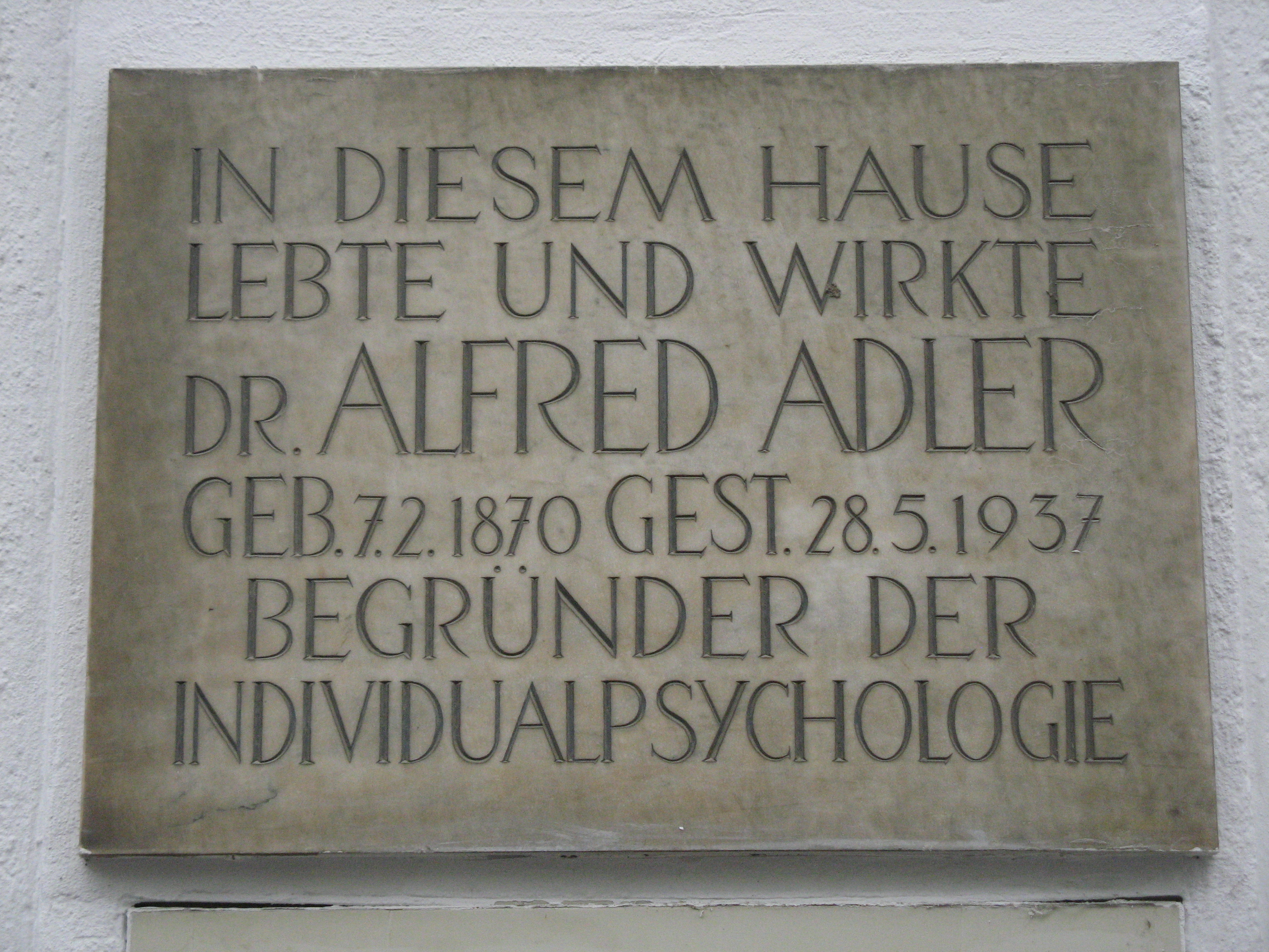 Gedenktafel für Alfred Adler an dessen Wohnhaus, Dominikanerbastei 10, Wien-Innere Stadt